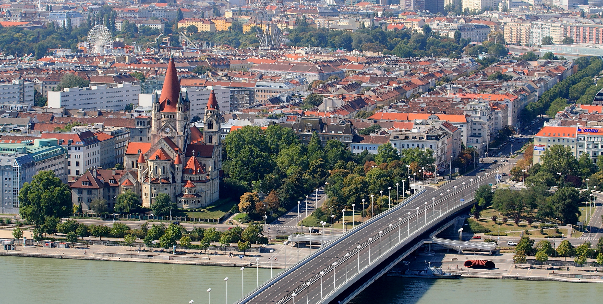 Der Mexikoplatz mit der Franz-von-Assisi-Kirche (Mexikokirche) vom linken Donauufer aus gesehen.